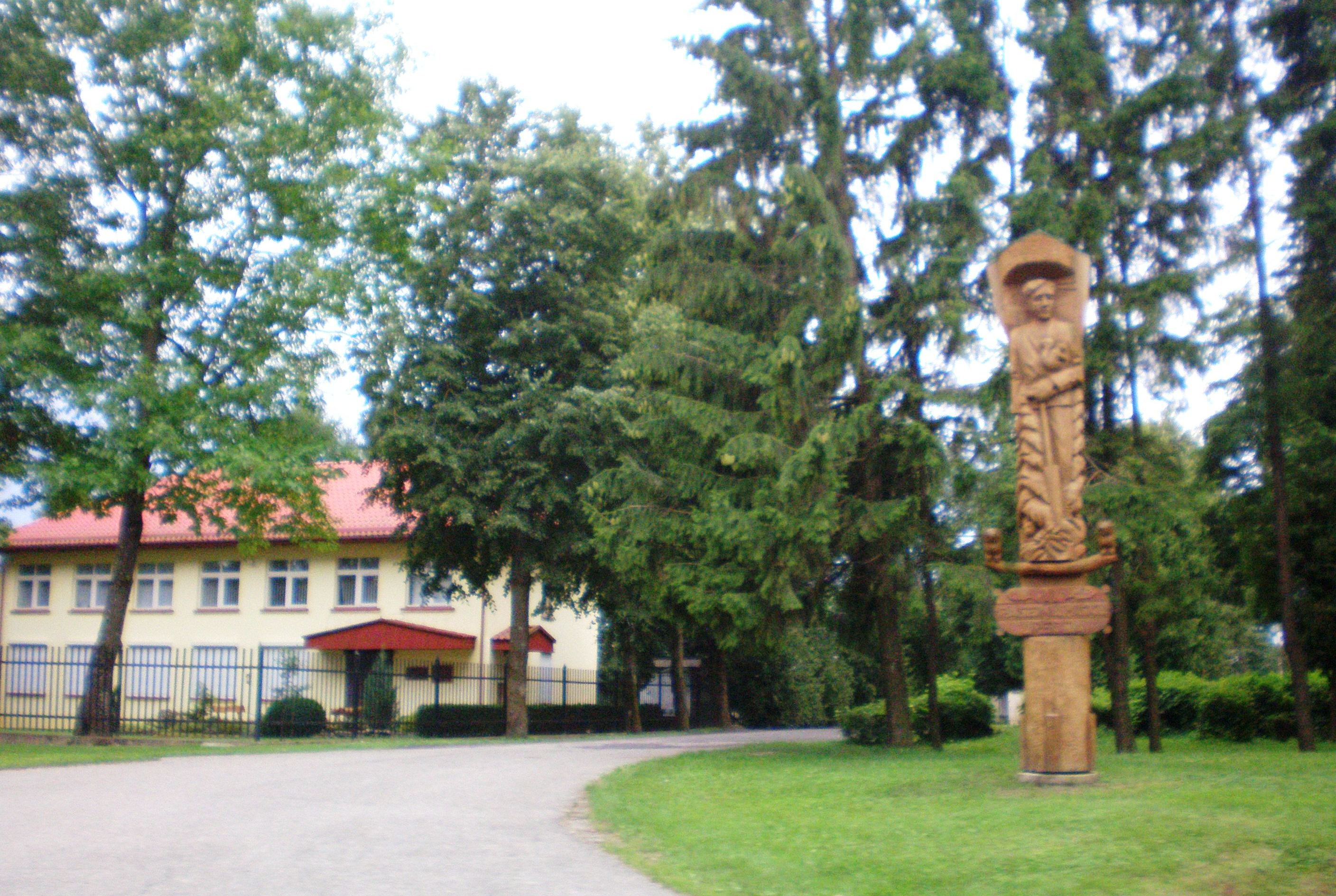 Norgėlai, Raseinių raj.